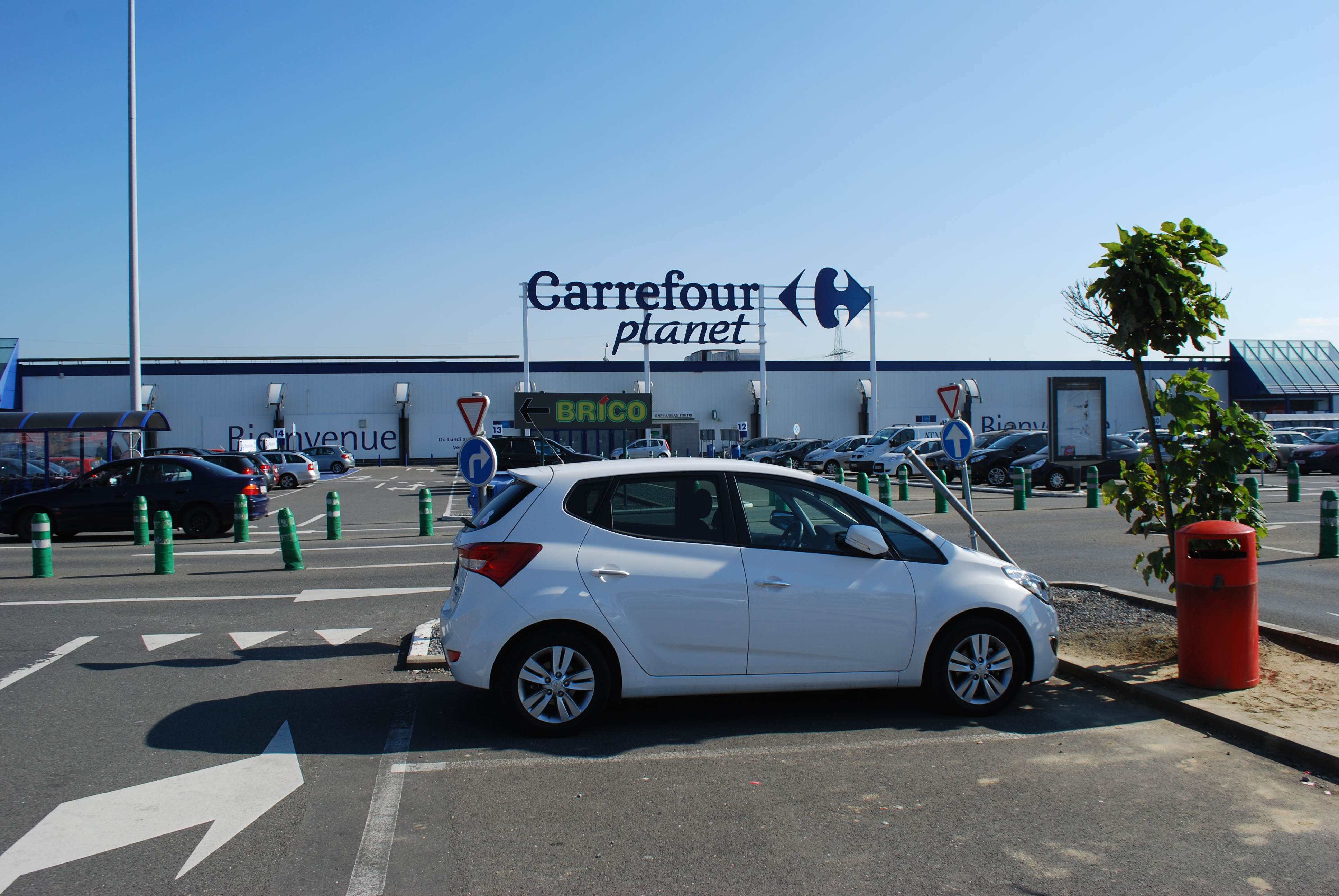 Vue du centre commercial "Basse Campagne" à Herstal.